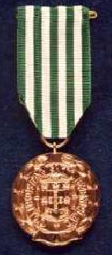 Medalha comportamento exemplar grau bronze